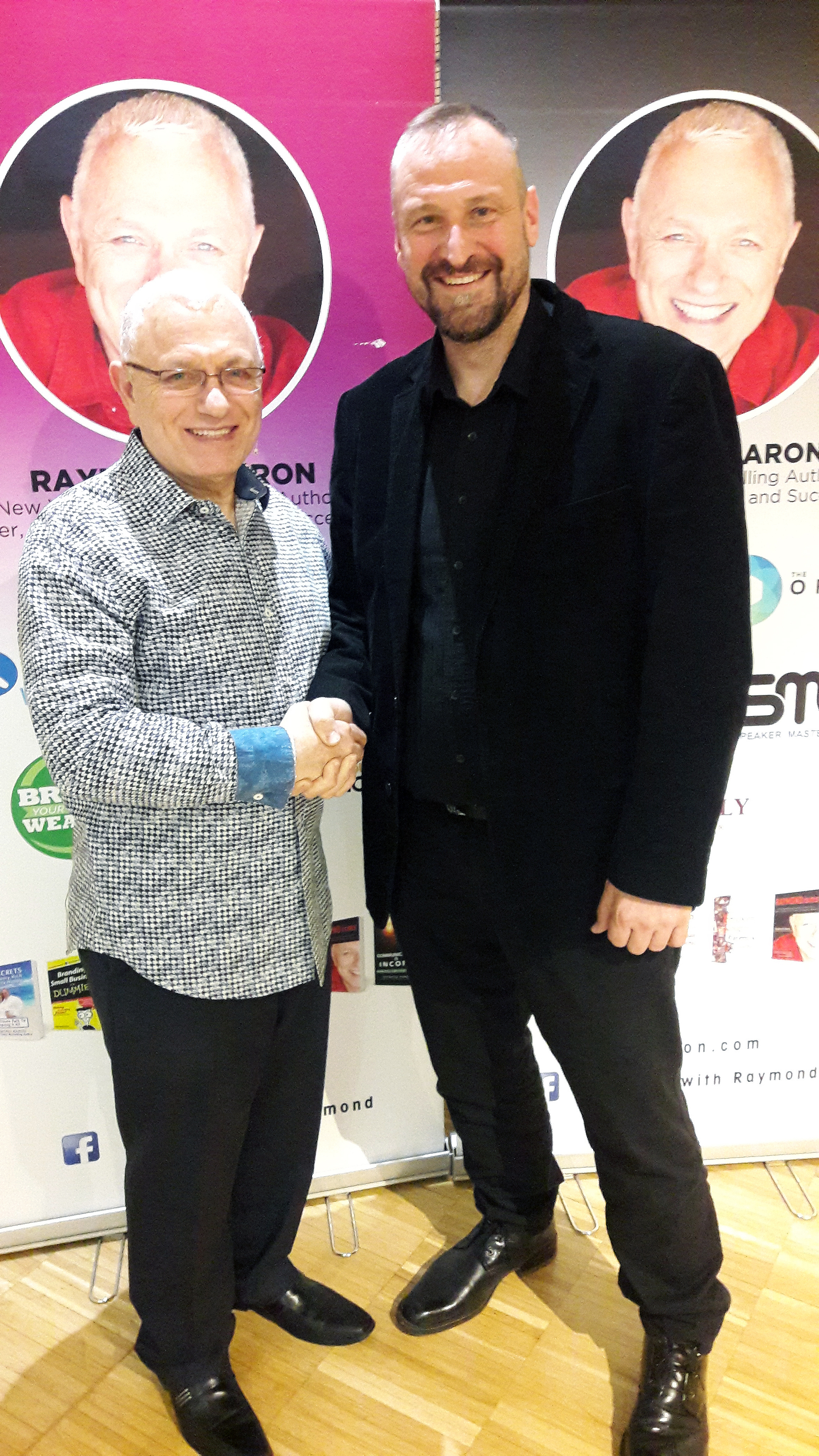 Dušan Waldhütter in Raymond Aaron, New York Times Bestselling Author